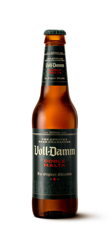 Cerveza Voll-Damm botella 33 cl